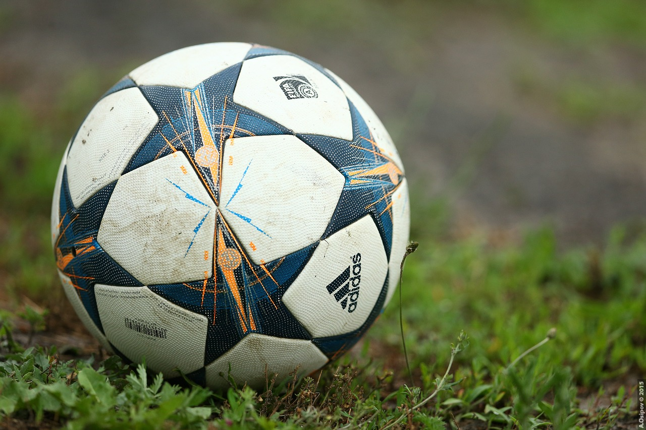 18.06.2015 Чемпионат Украины среди аматоров. Колос (Зачепиловка) - Балканы (Заря) - 0:0 «Колос» (Зачепиловка): Антоненко, Кучук (Нерубенко, 61), Васильев, Билык, Цапий, Михайлюк, Жданов (к), Тарасов, Батусов, Дяченко (Воробей, 79), Шарко. Запасные: Давыдов, Кателин, Котенко, Бодня. «Балканы» (Заря): Паламарчук, Д.Пархоменко, Саламаха, Ильницкий, Пенов (Полтавец, 90+4), Гаврилюк, К.Пархоменко, В.Златов (Е.Райчев, 70), Урсуленко, А.Райчев (к), В.Кириллов (Лазаренко, 81). Запасные: Потароченко, А.Кириллов, Голубев, Куртов. Предупреждения: Тарасов, 44; Шарко, 79 – В.Златов, 23; В.Кириллов, 63; Гаврилюк, 67; Пенов, 87. Судьи: А.Омельченко (Славянск), Д.Сердюк (Полтава), В.Попков (Волноваха). Четвертый арбитр – А.Афанасьев (Норцовка, Харьковская область). Наблюдатель арбитража – В.Головко (Днепропетровск).